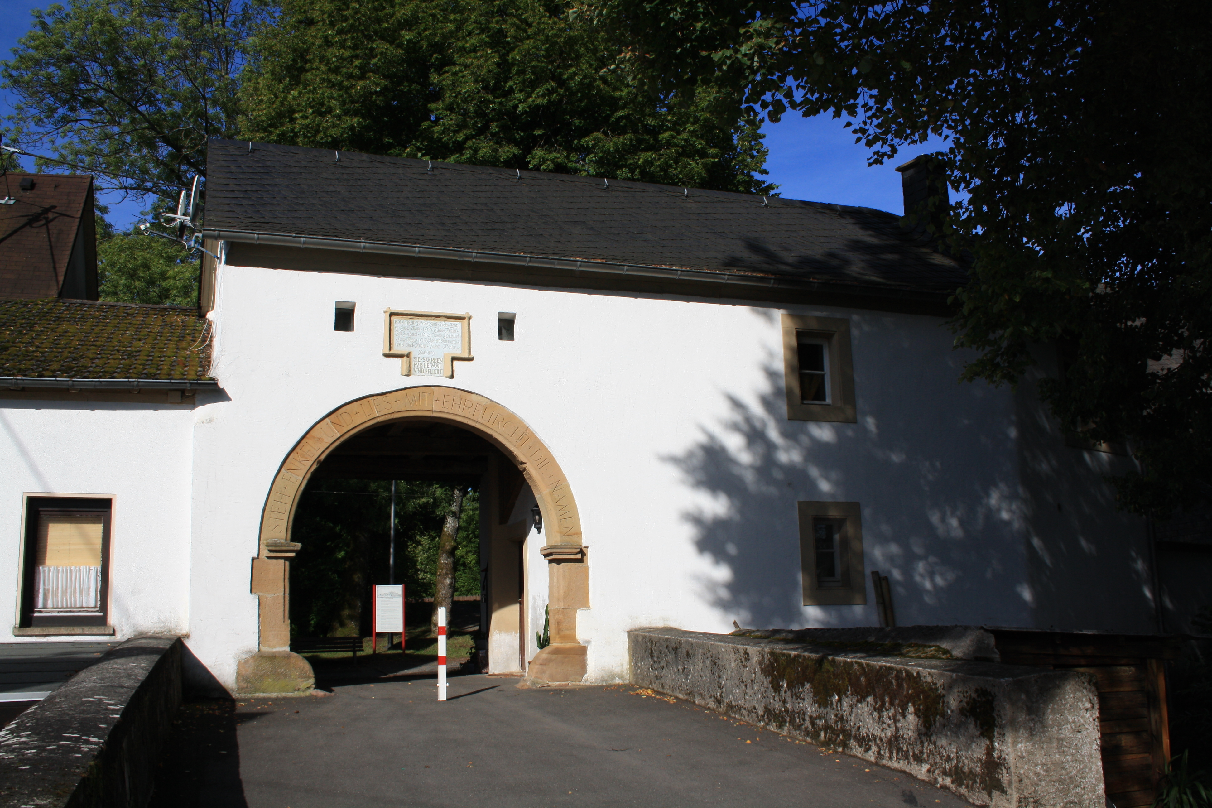 Torhaus der Burg(ruine) in Birkenfeld (Nahe)